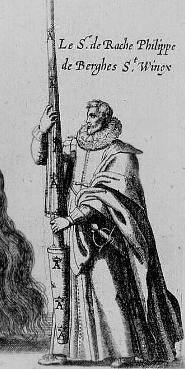 Pompes funèbres de l'archiduc Albert d'Autriche à Bruxelles / Série de 65 gravures d'un recueil relatant les funérailles d'Albert d'Autriche à Bruxelles le 11 mars 1622.